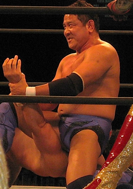 2015年3月22日 ベイコム総合体育館「Road to INVASION ATTACK 2015」中西学に腕固めを極める永田裕志